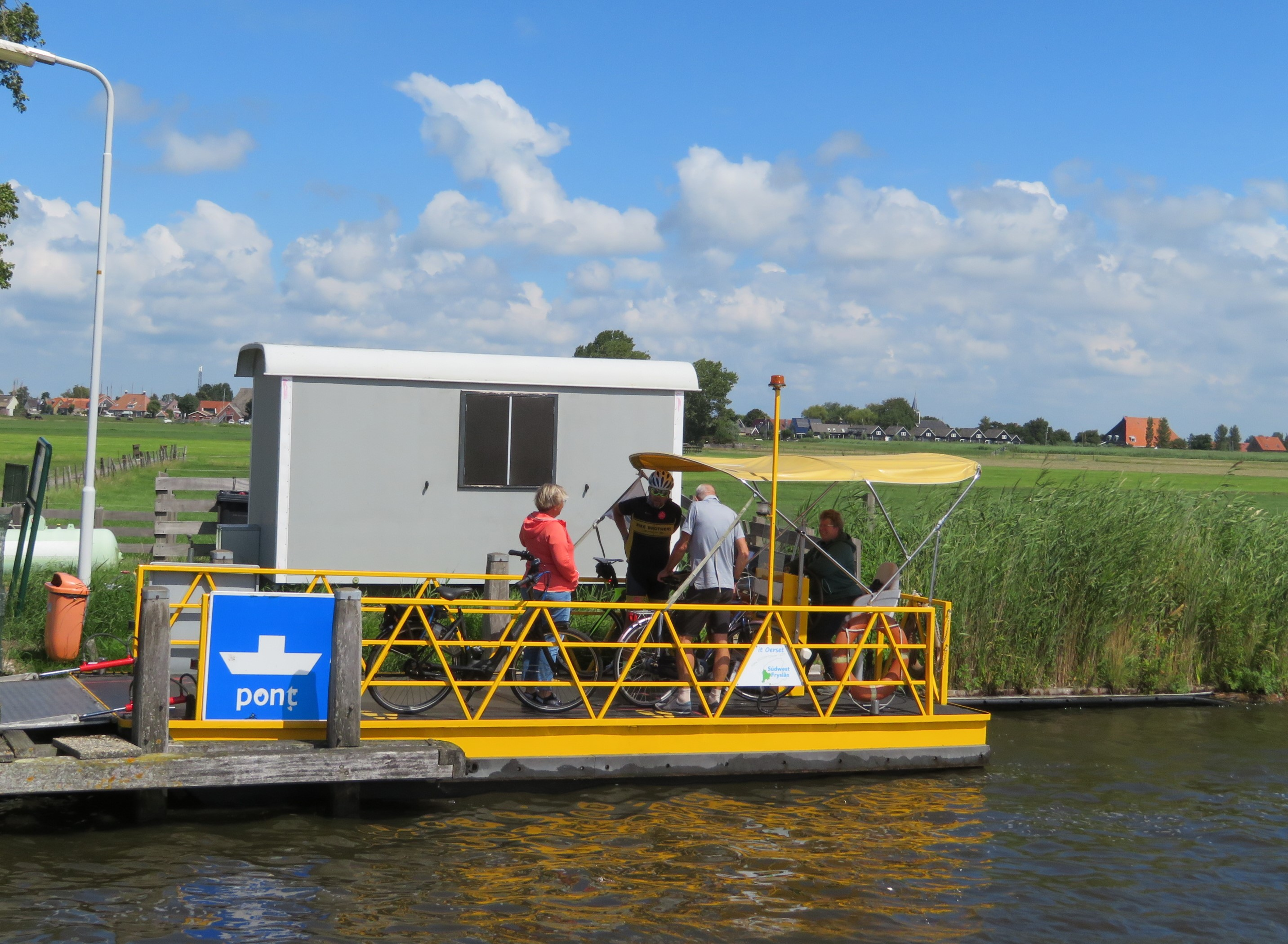 Motorveerpont over de Yntemasloot, Friesland